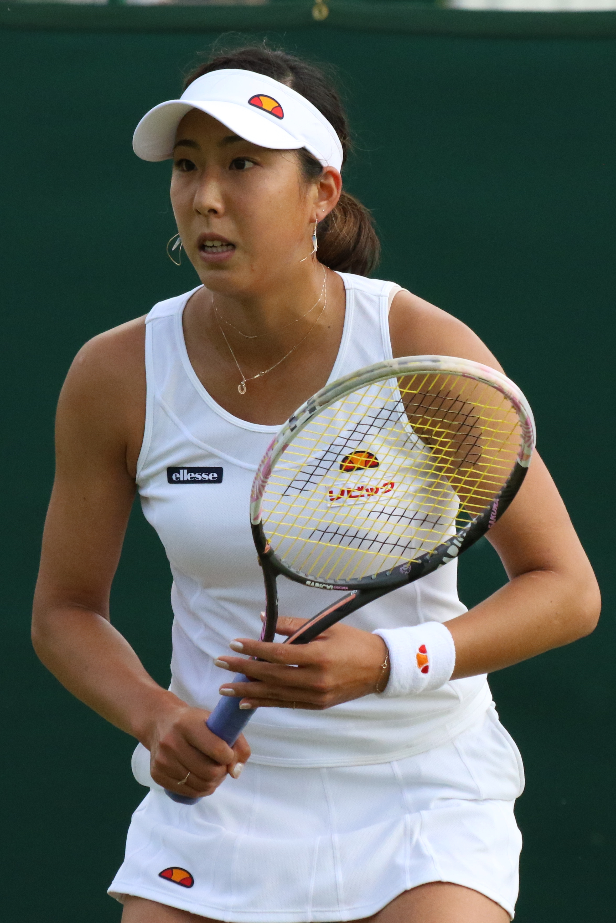 Eguchi WMQ16 (7)